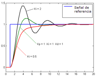 Pv en funcion del tiempo (integral)